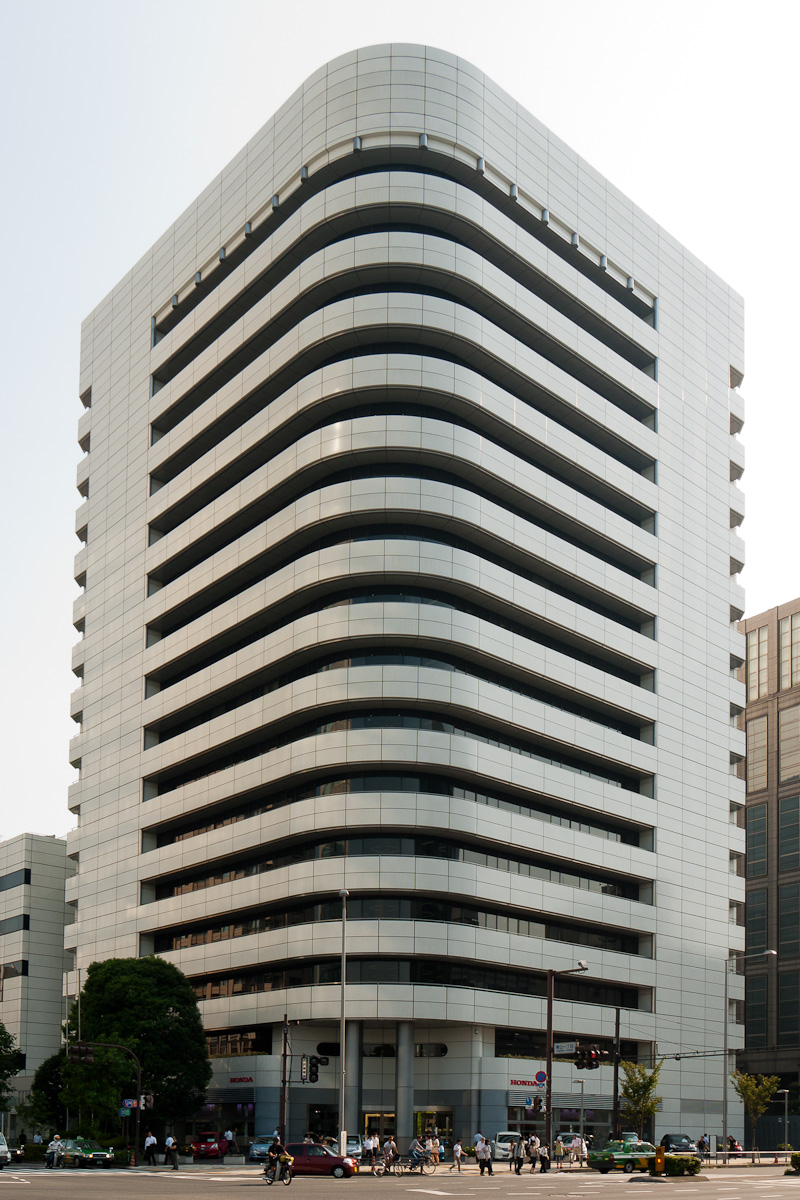 本田技研工業本社ビル、東京都港区南青山1丁目。